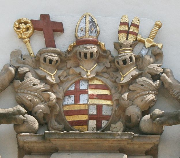 Wappen auf der Vorhalle der Busdorfkirche Paderborn 1667